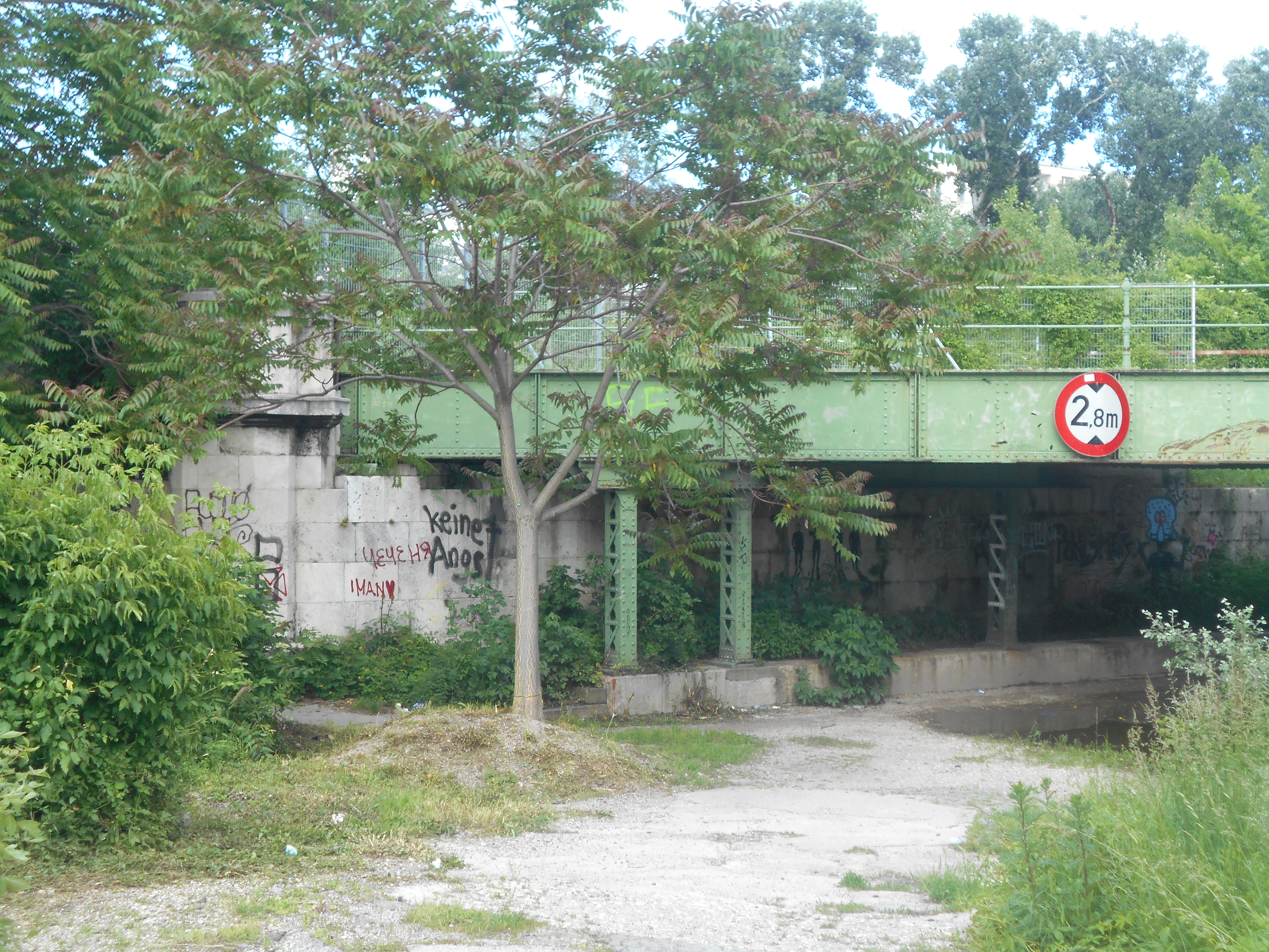 Alte Eisenbahnbrücke am Nordbahnhofgelände.